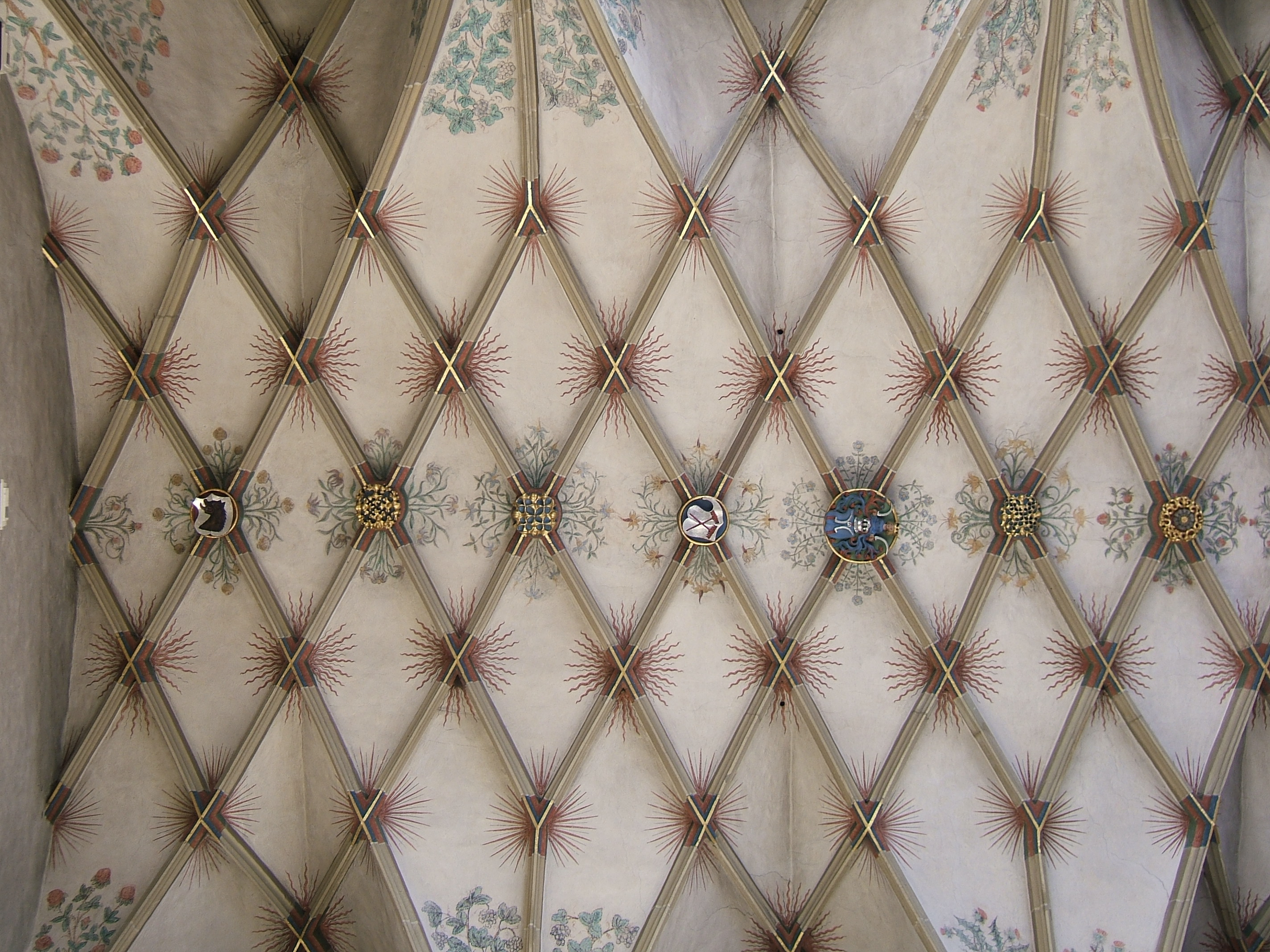 St.-Veit-Kirche Gärtringen, Chorgewölbe